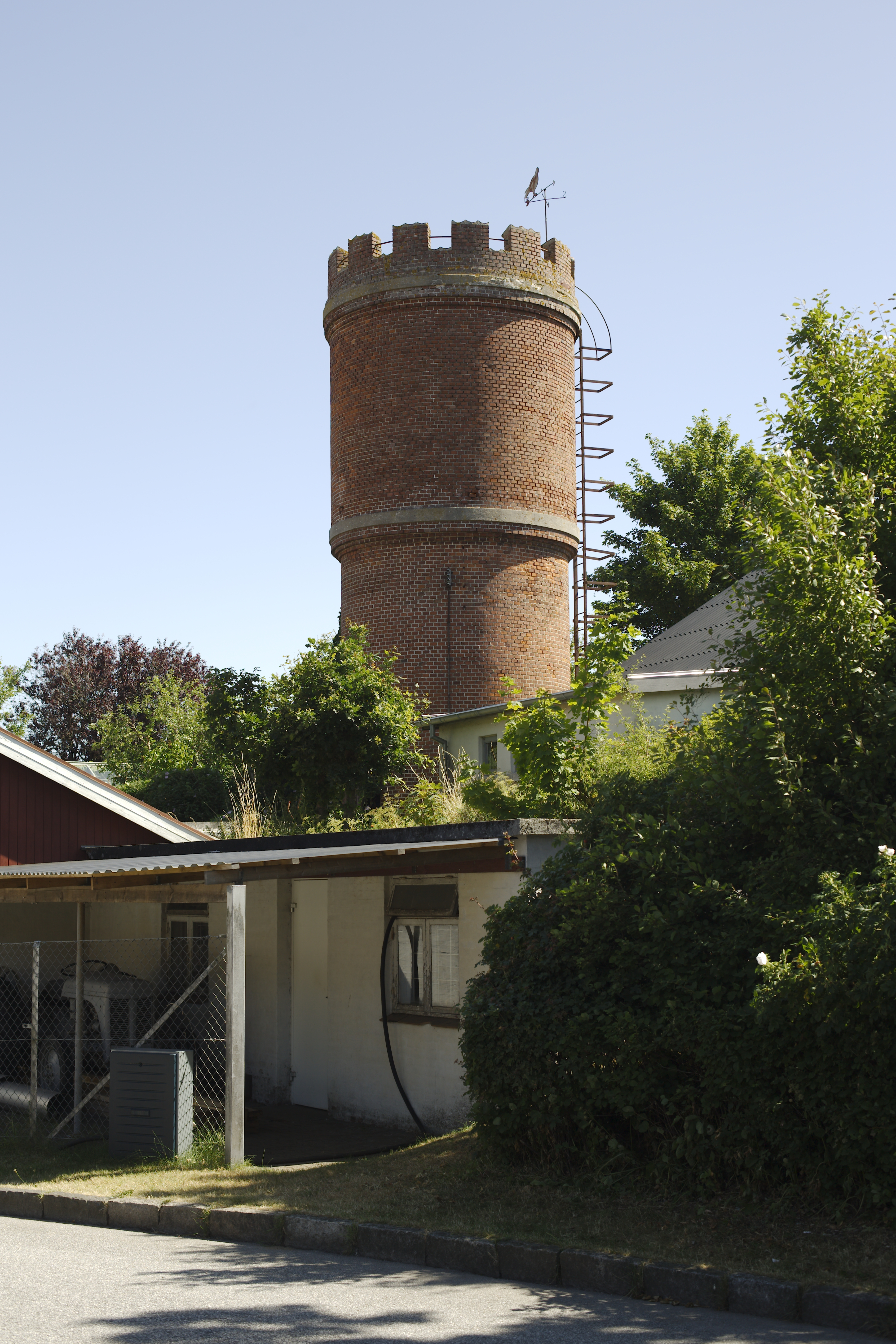 Stilling vandtårn